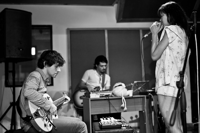 Bomba Estéreo - Up Close and Personal - 2012